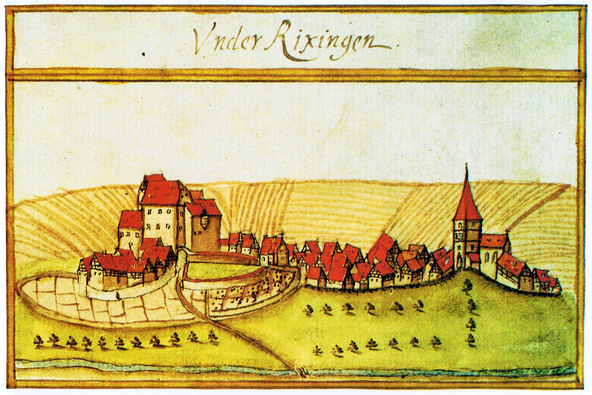 Unterriexingen aus dem Forstlagerbuch von Andreas Kieser